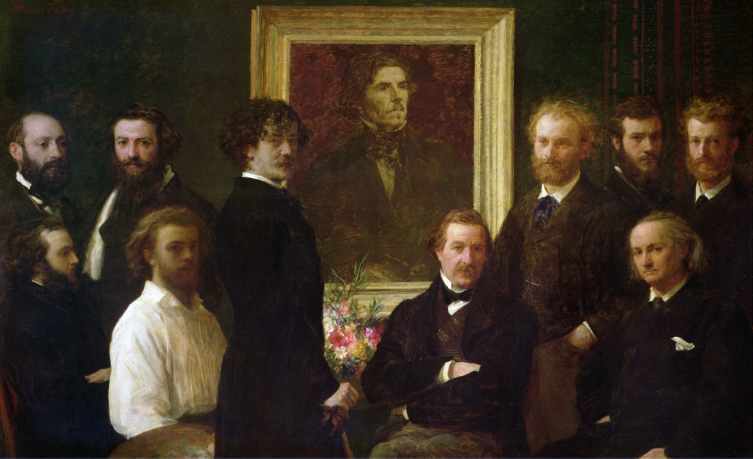 Identification des personnes, de gauche à droite : Assis : Louis Edmond Duranty, Henri Fantin-Latour le peintre auteur du tableau lui-même, Jules Champfleury, Charles Baudelaire. Debout : Louis Cordier, Alphonse Legros, James Whistler, Édouard Manet, Félix Bracquemond, Albert de Balleroy. Au centre un autoportrait d' Eugène Delacroix